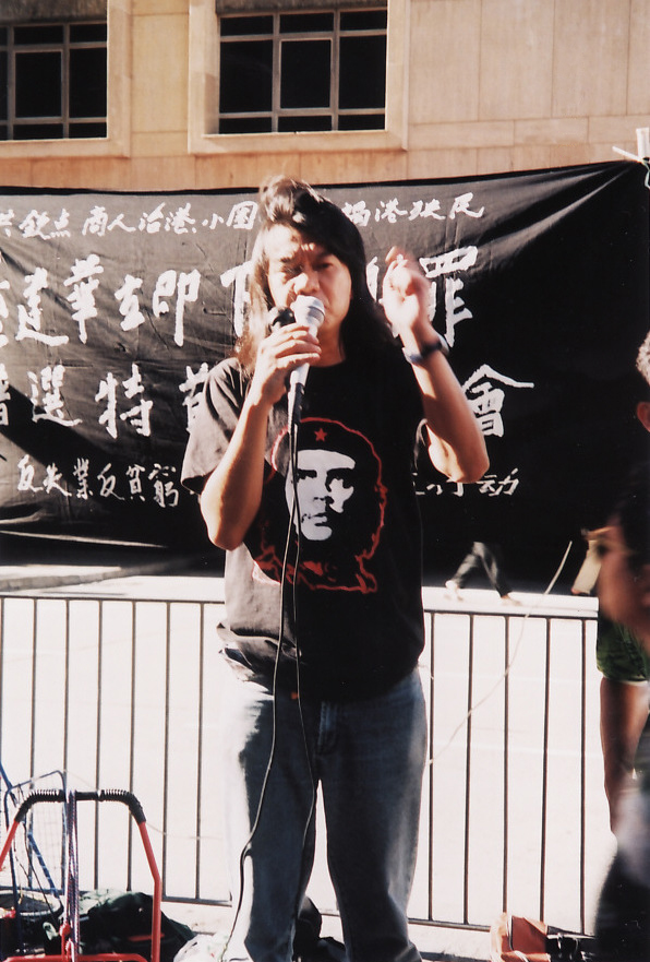 2003年7月13日「民主大會」遮打道，舊立法會前，慶祝特區政府終於撤回基本法廿三條立法，並討論爭取民主。「長毛」梁國雄出席，並提倡要特首董建華下台。